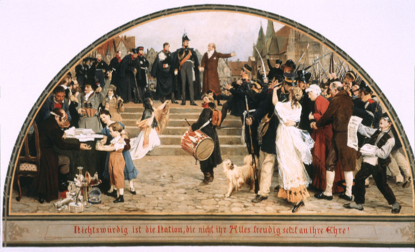 Die nationale Erhebung 1813. Öl auf Leinwand, 135 x 89 cm. Kunsthalle zu Kiel.